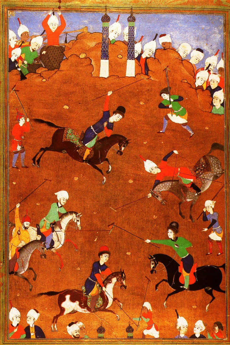 چوگان‌بازان، نگارگری ایرانی، کتابخانهٔ سرای توپقاپی استانبول..